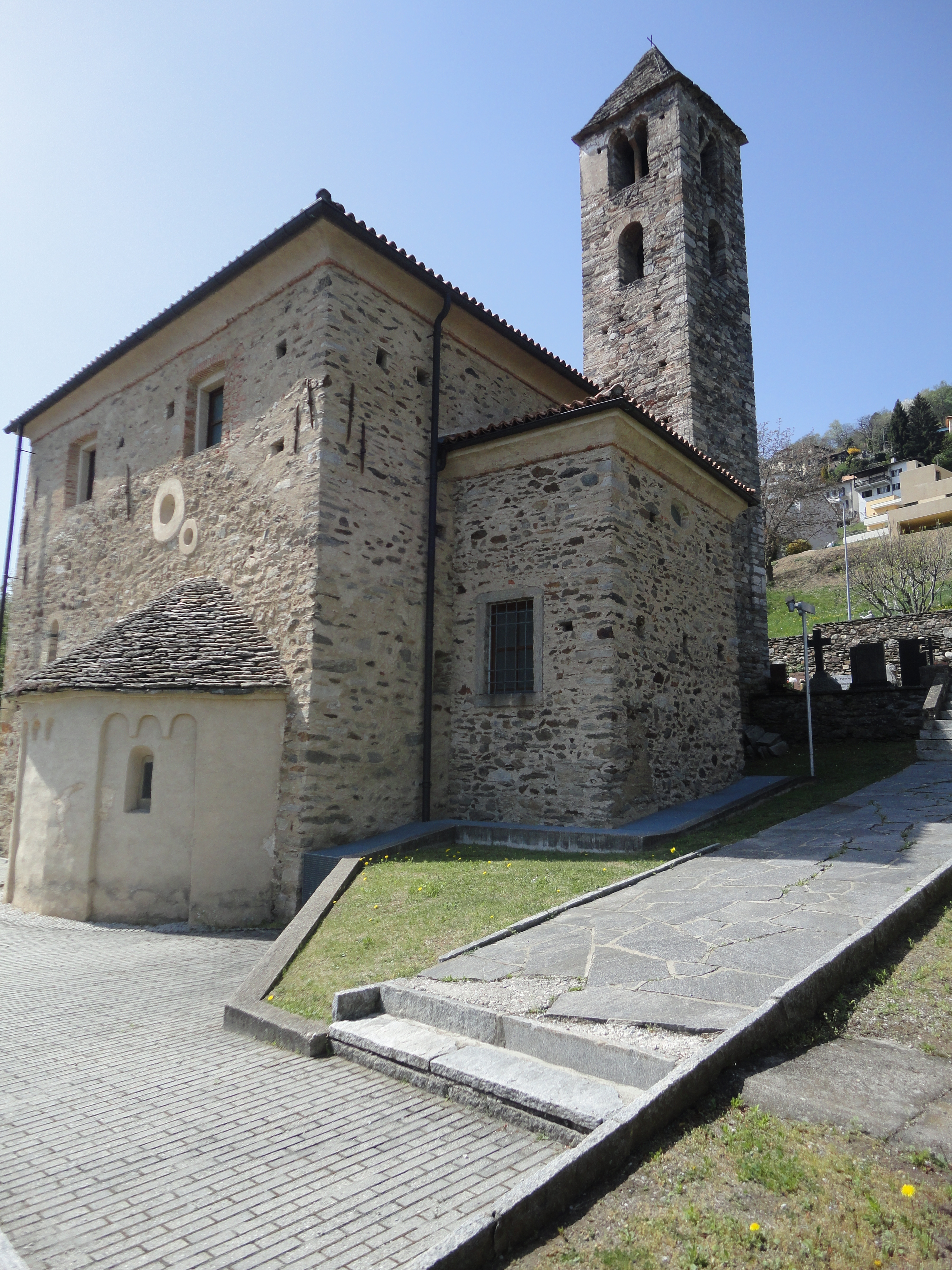 Cademario - Chiesa Sant'Ambrogio vecchio - Esterno delle absidi